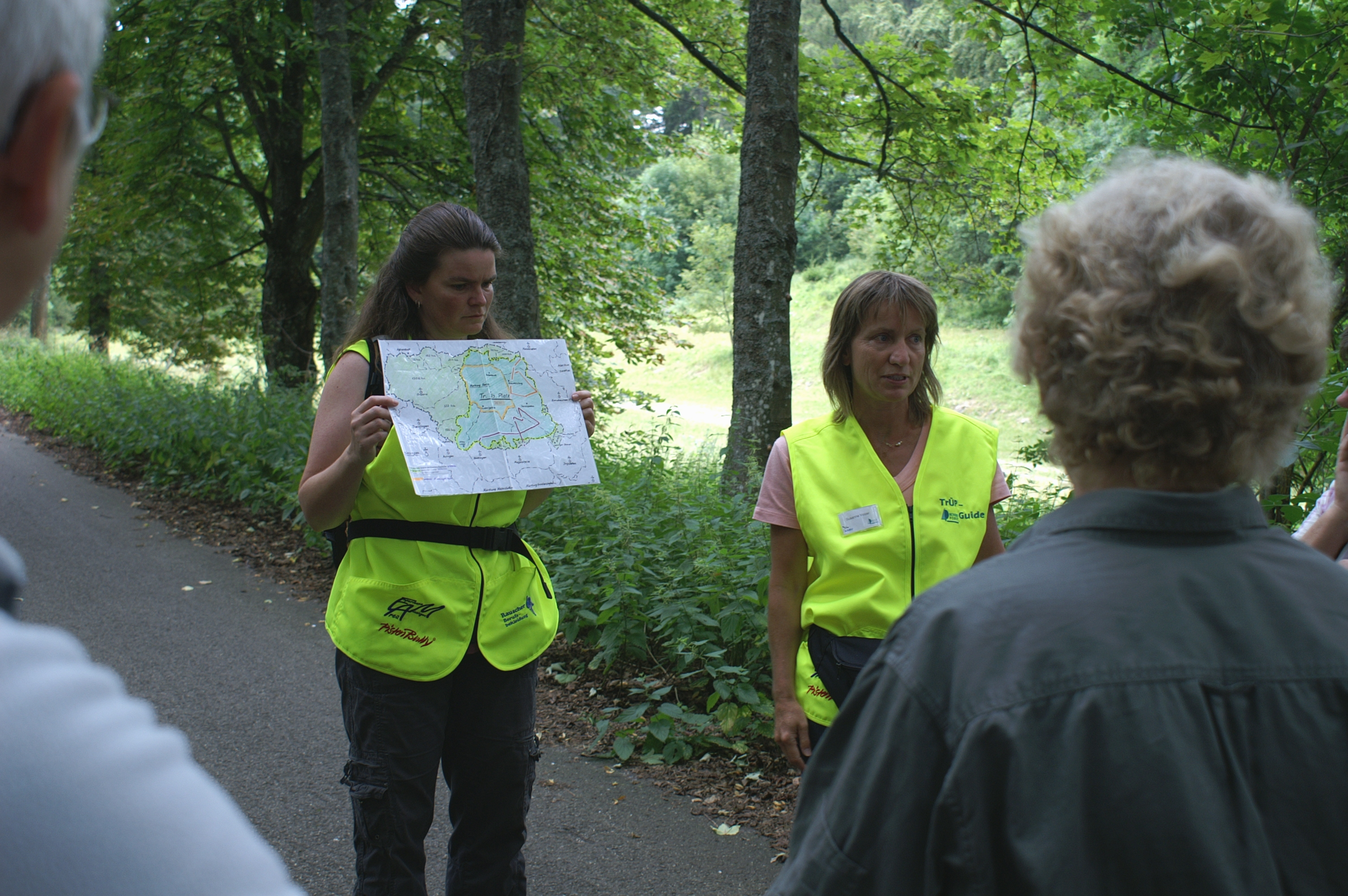 TrÜP-Guides erläutern bei geführten Touren durch den ehemaligen Truppenübungsplatz Münsingen die wechselvolle Vergangenheit des Areals und zeigen die Besonderheiten der Tier- und Pflanzenwelt dieses Gebietes